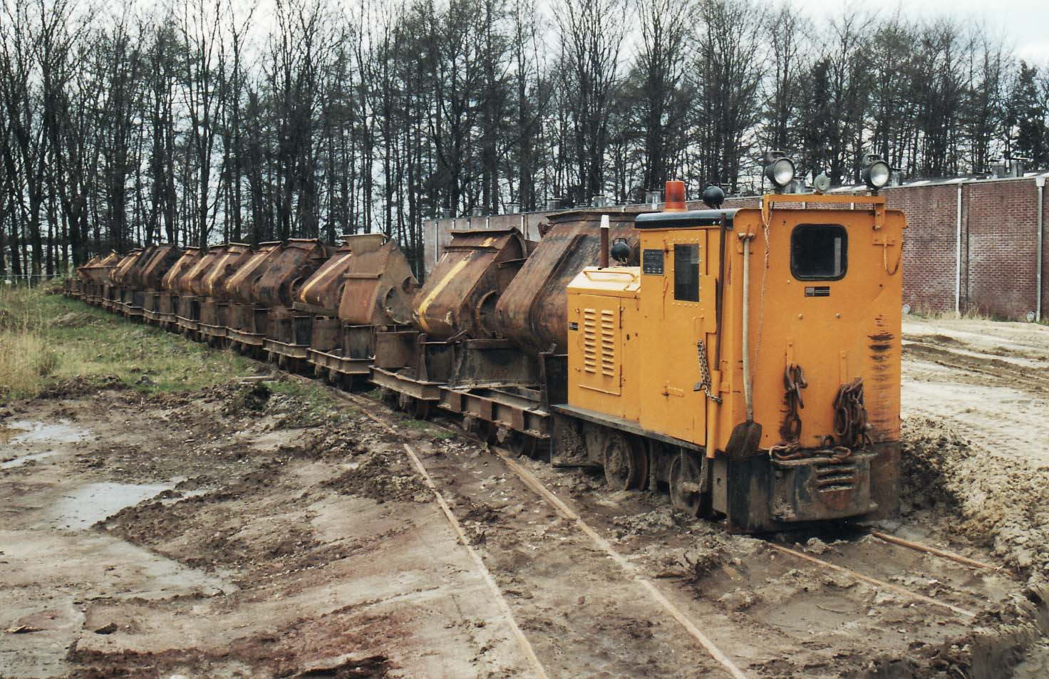 Kipkarren bij Steenfabriek de Vlijt in Winterswijk